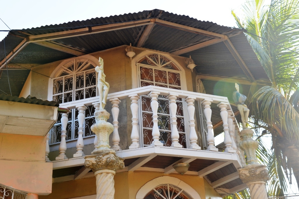 Casa en Tisma, cerca el parque central.